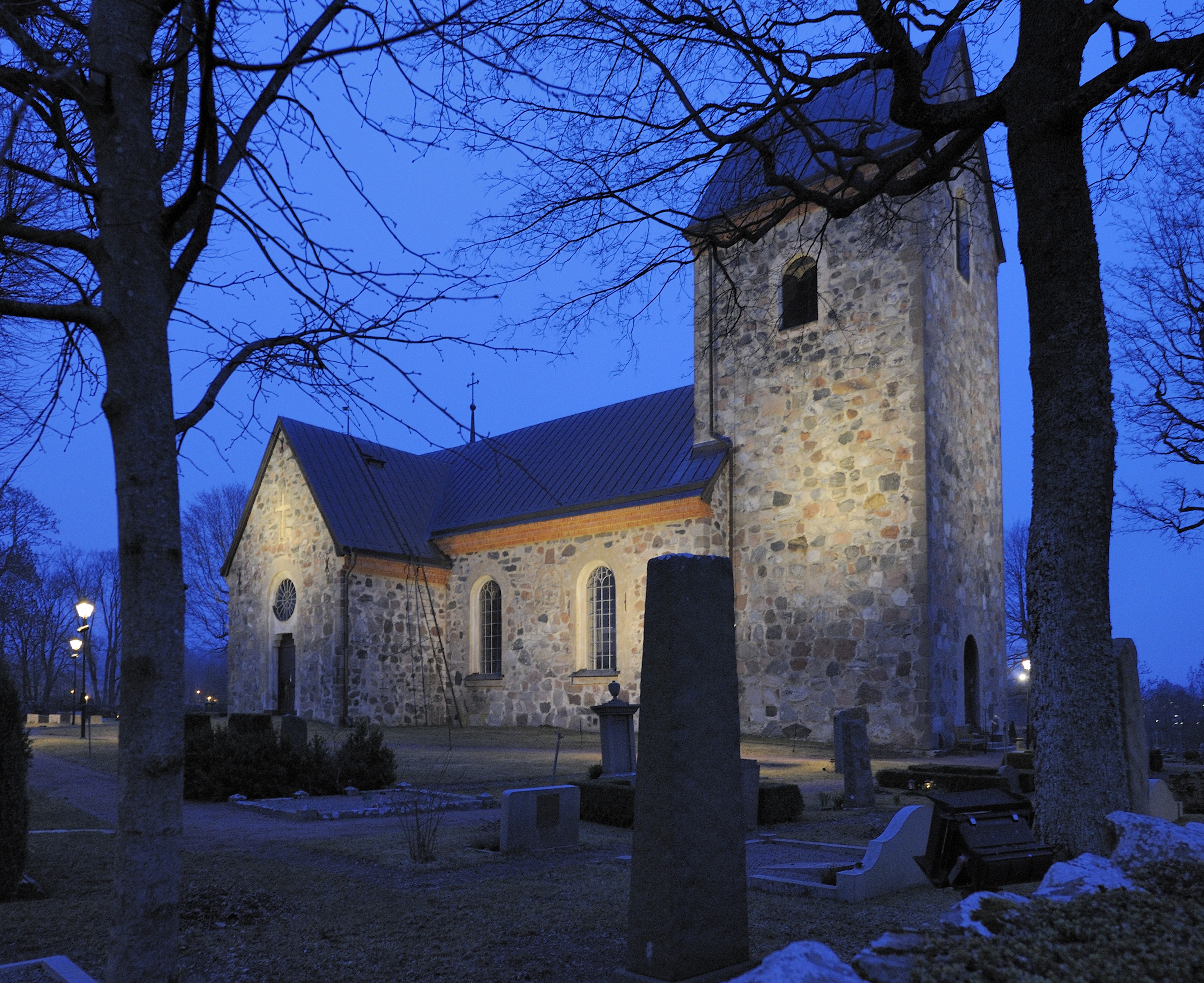 Kirche in Vallentuna/Schweden